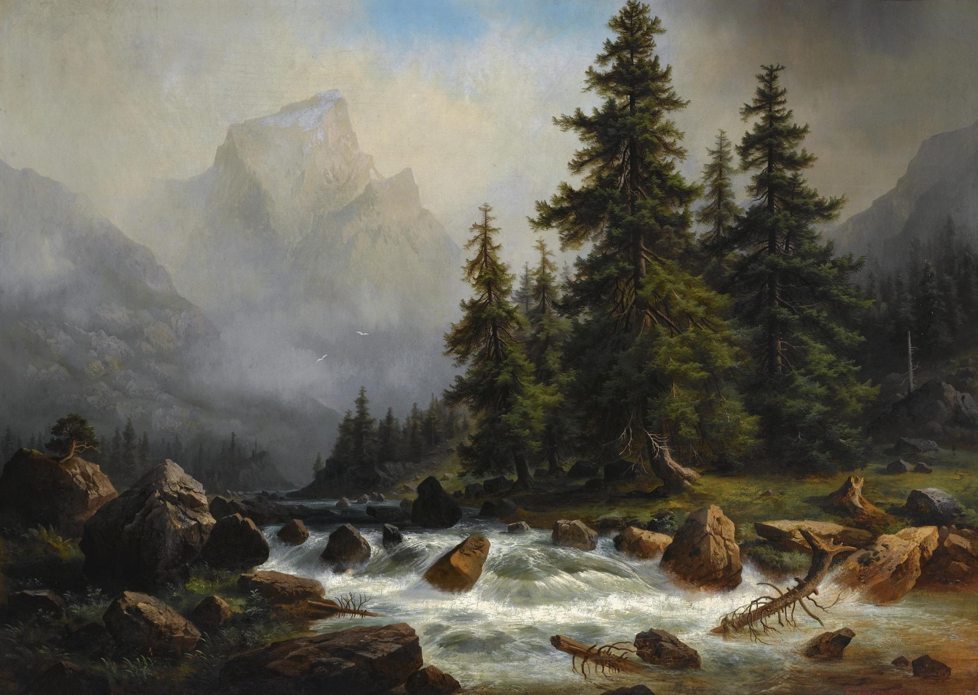 1876 datiertes und von dem Maler Gustav Hausmann signiertes Ölgemälde mit einem Blick auf das Wetterhorn, Öl auf Leinwand, 91 x 121.5 cm, rückseitig mit dem Eigentümer-Etikett Fürst zu Stolberg-Wernigerode. Im Jahr 2008 wurde das Ölgemälde bei Sothebys nach einer Schätzung von 3000 — 5,000 Euro zu einem Hammerpreis von 3125 Euro (Hammerpreis mit Käuferprovision) zugeschlagen ...